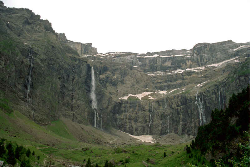 Circo y cascada de Gavarnie, en la cara Norte del macizo de Monte Perdido, pero ya en territorio francés. Con más de 400 metros de caída vertical es la cascada más alta de Europa.